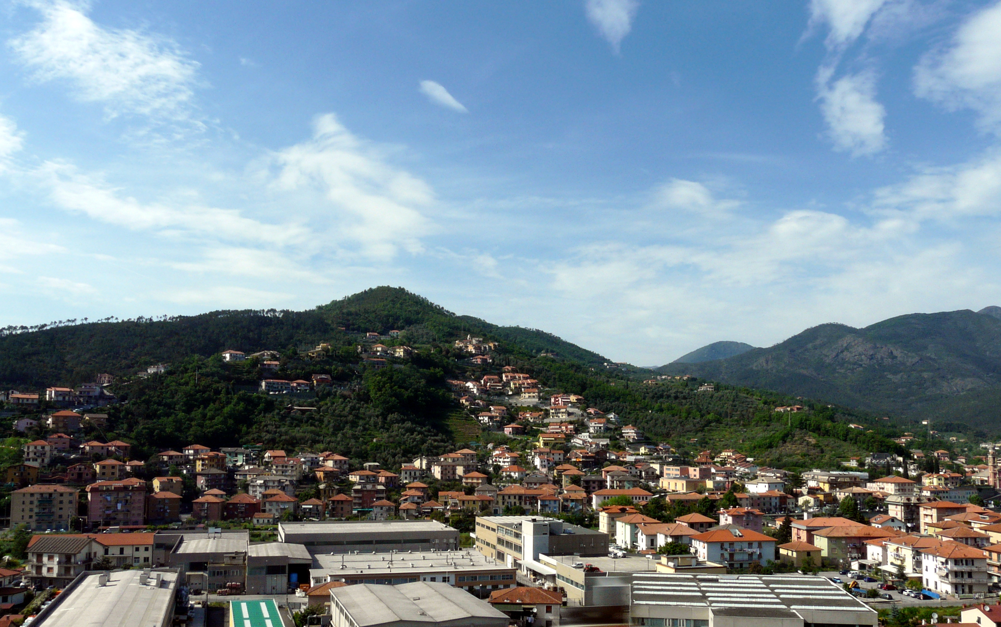 Panorama di Casarza Ligure, Liguria, Italia